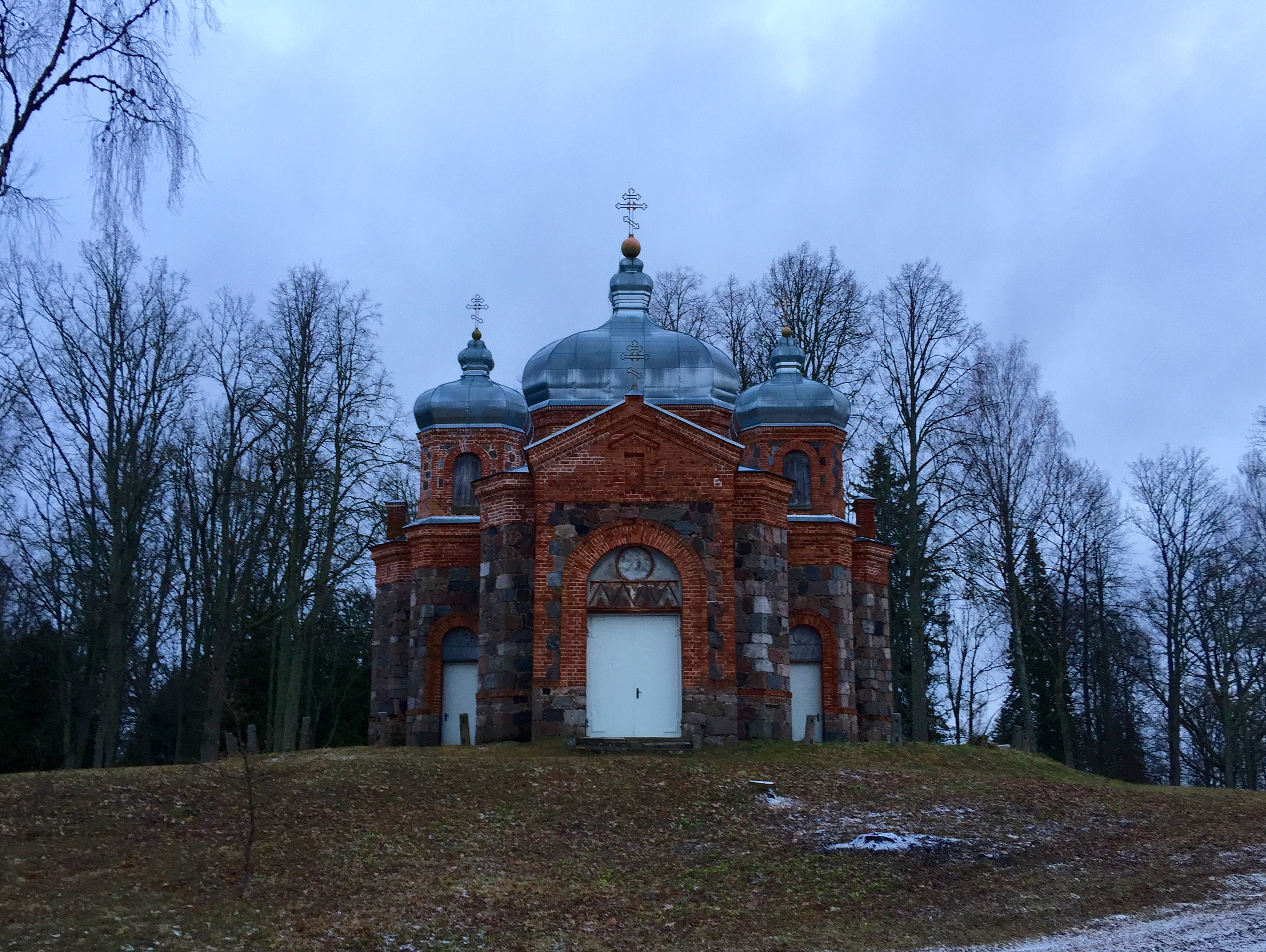 Ilmjärve Jumala ilmumise kirik (2016)